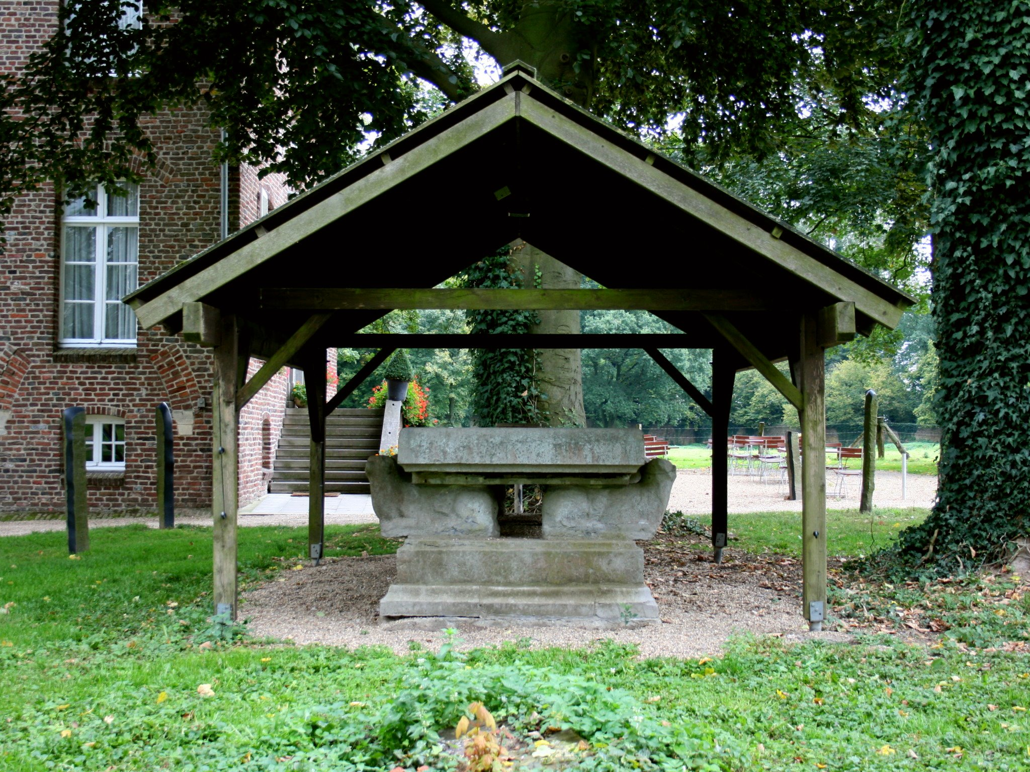 Grab von Otto II (Geldern) im Kloster Graefenthal in Goch-Asperden